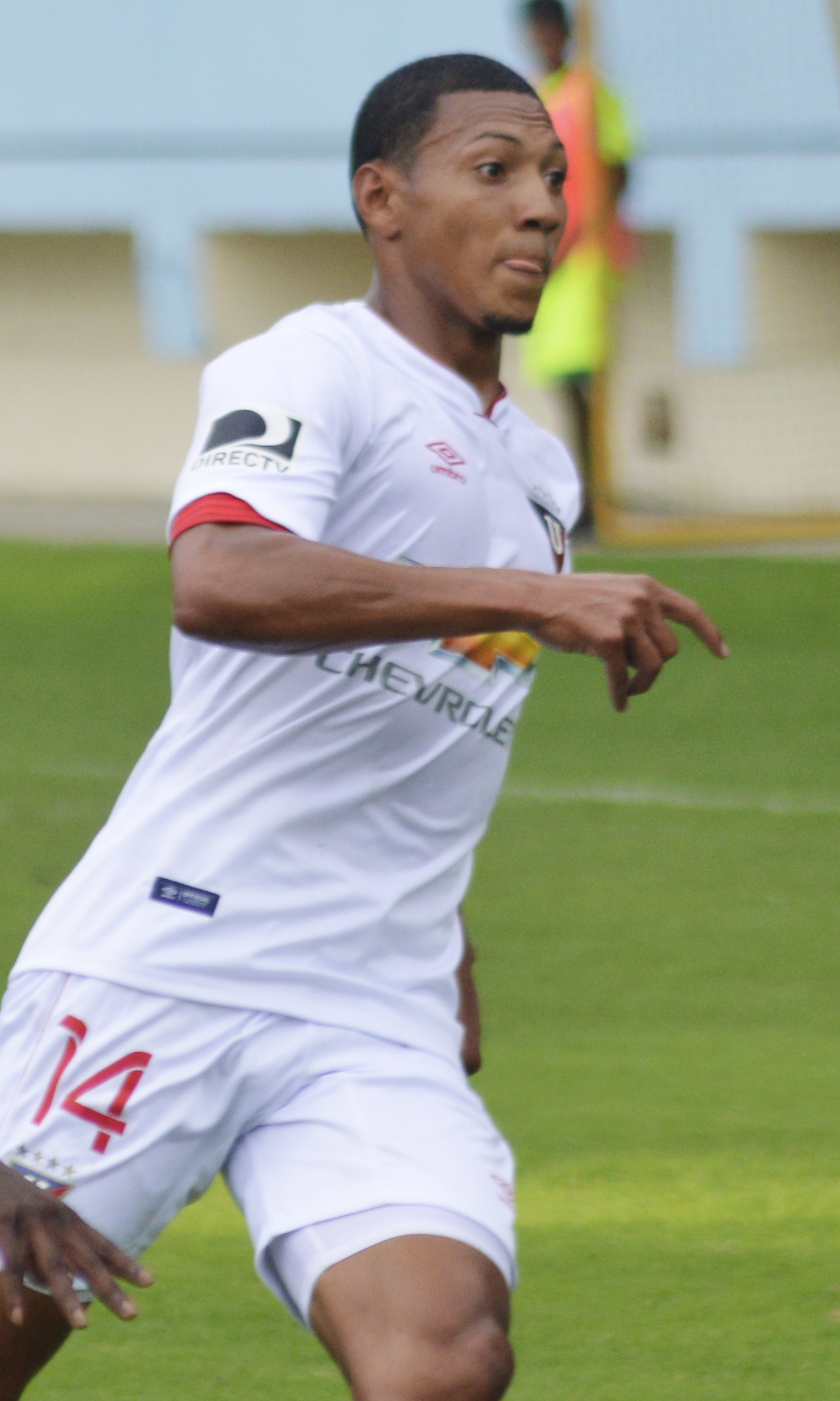 José Quinteros en Liga de Quito en 2016